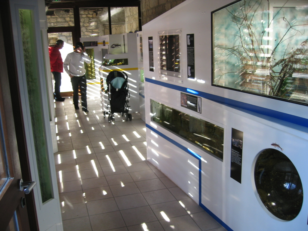 Citadelle de Besançon